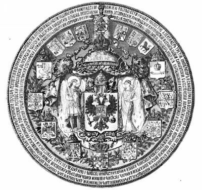 Большая государственная печать Императора Александра III